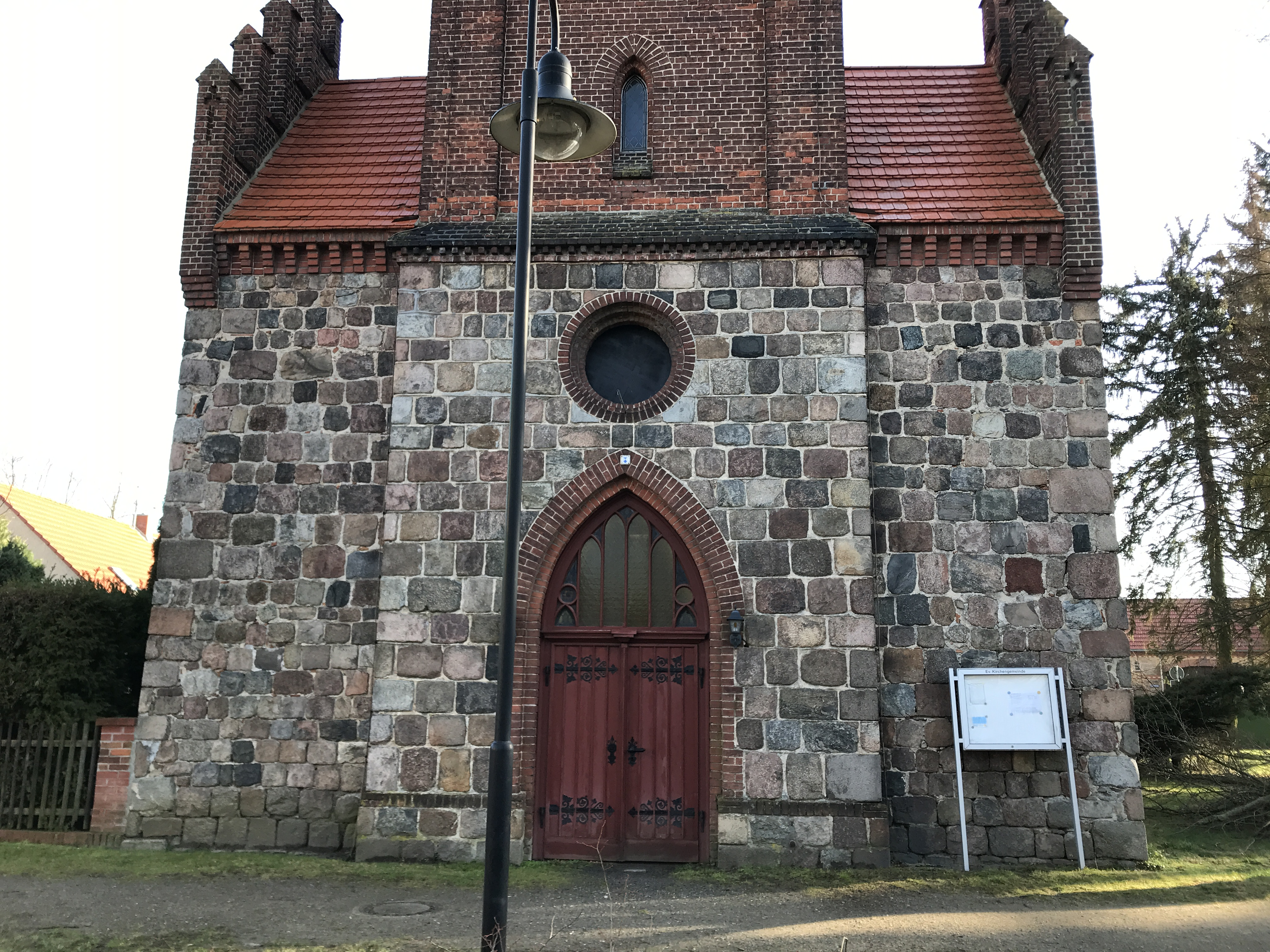 Die Dorfkirche Wahlsdorf ist eine spätromanische Feldsteinkirche aus der ersten Hälfte des 13. Jahrhunderts in Wahlsdorf, einem Ortsteil von Dahme/Mark in Brandenburg. Die Kirchenausstattung ist neugotisch.